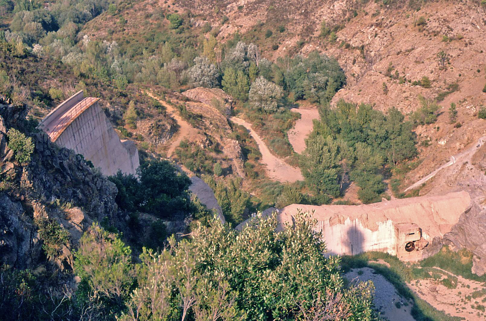 Ruine vum Malpasset.